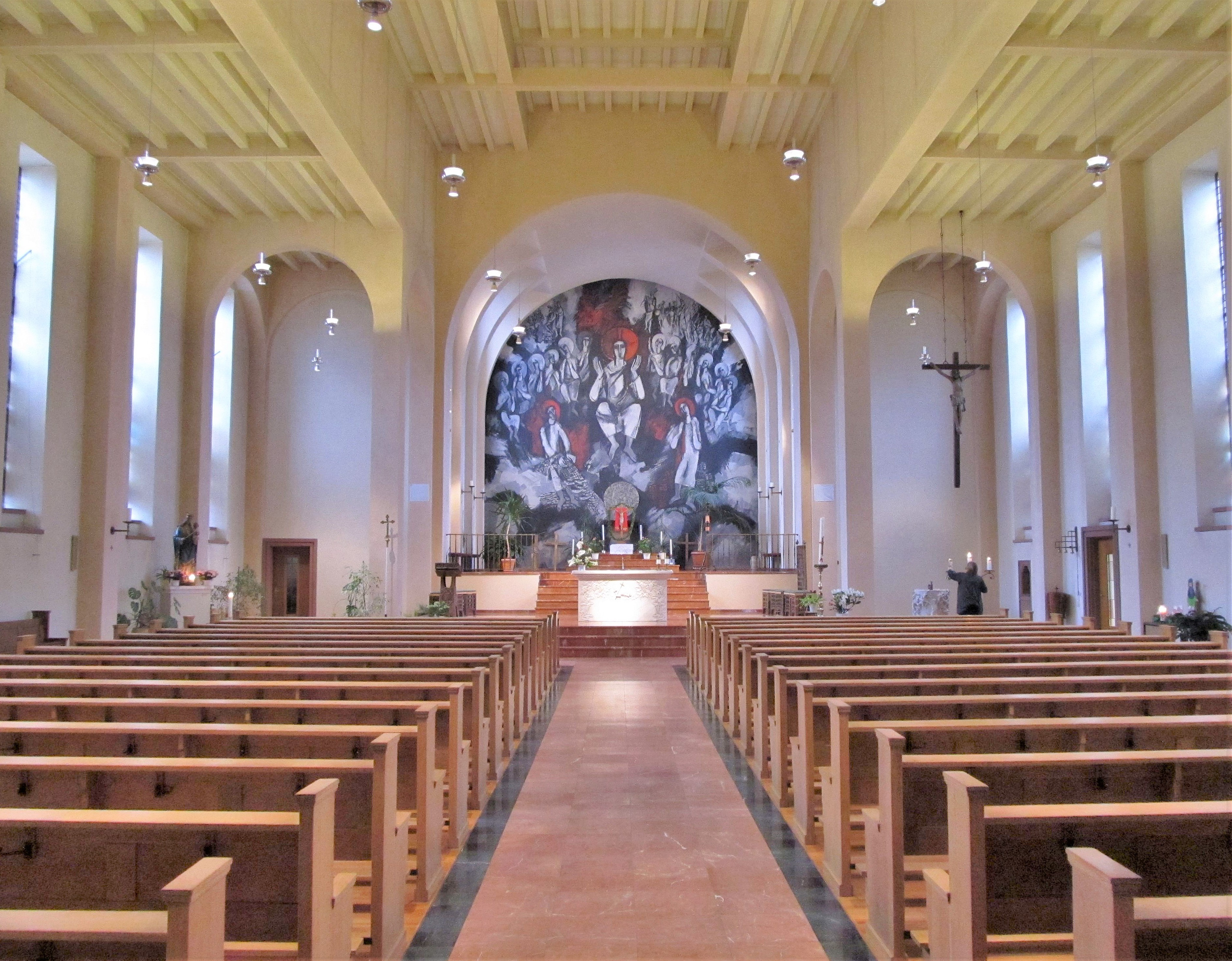 Blick ins Innere der katholischen Pfarrkirche Herz Jesu in Wustweiler, einem Ortsteil von Illingen, Landkreis Neunkirchen, Saarland